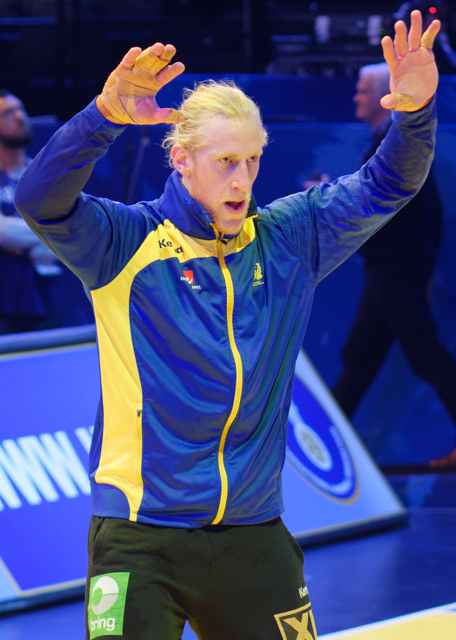 Match de la phase préliminaire du championnat du monde masculin de handball 2017 entre la Suède et le Danemark (Groupe D). A Bercy, le 16 janvier 2017.